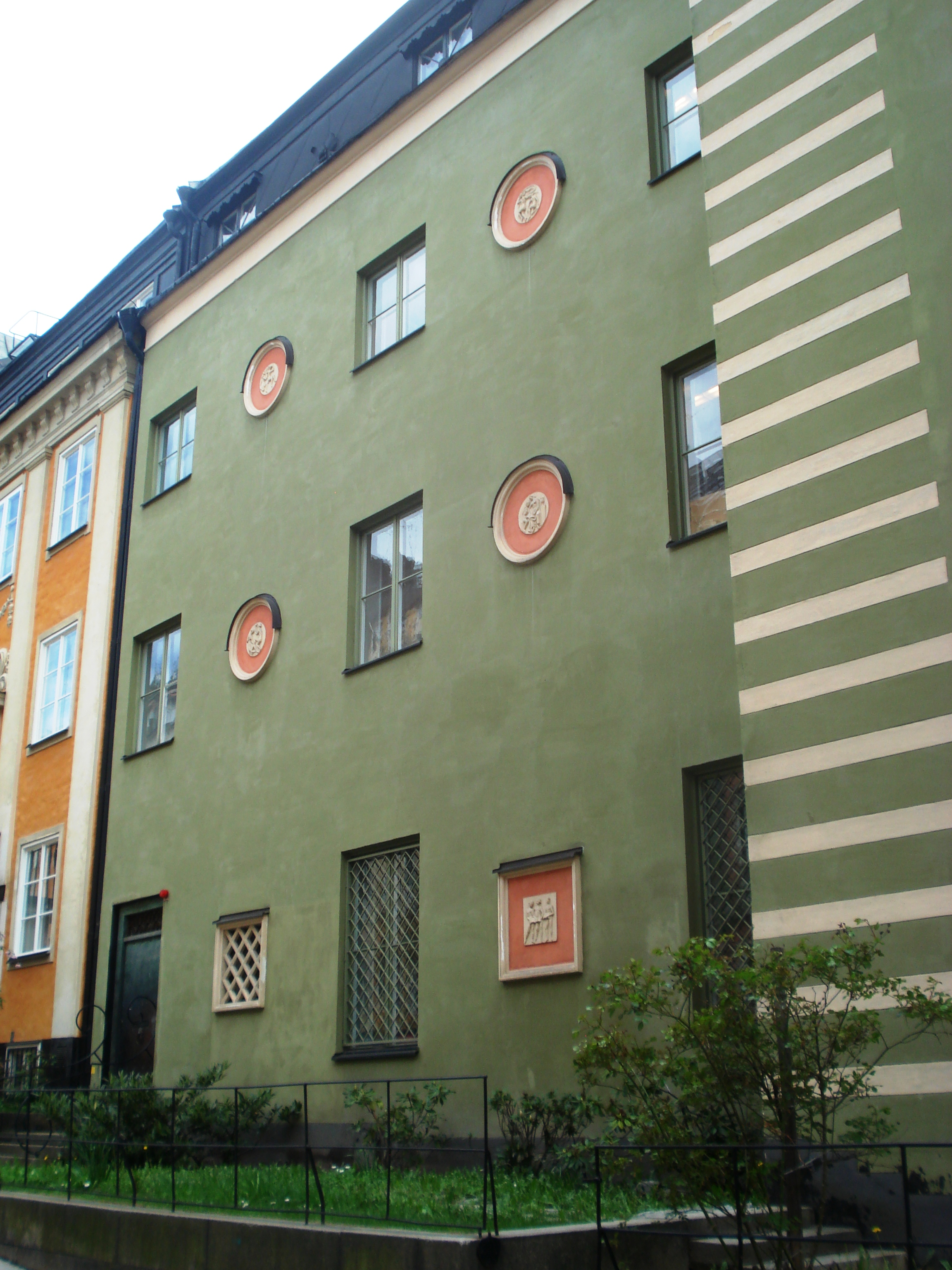 Deutsche Schule Stockholm, Nebengebäude Danderydsgatan